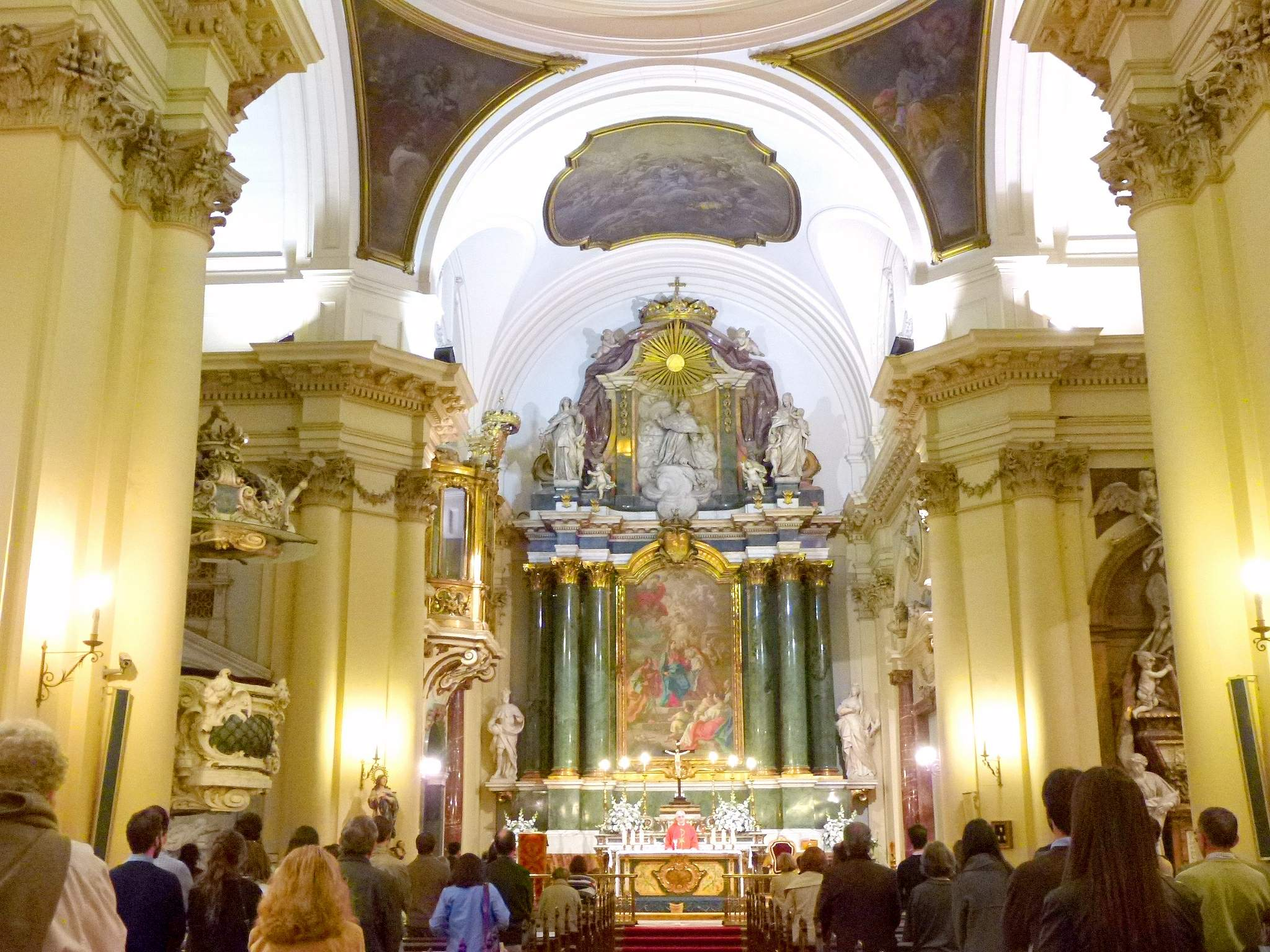 Iglesia de Santa Bárbara (ex Convento de las Salesas Reales), en Madrid